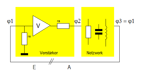 Prinzip eines rückgekoppelten Oszillators